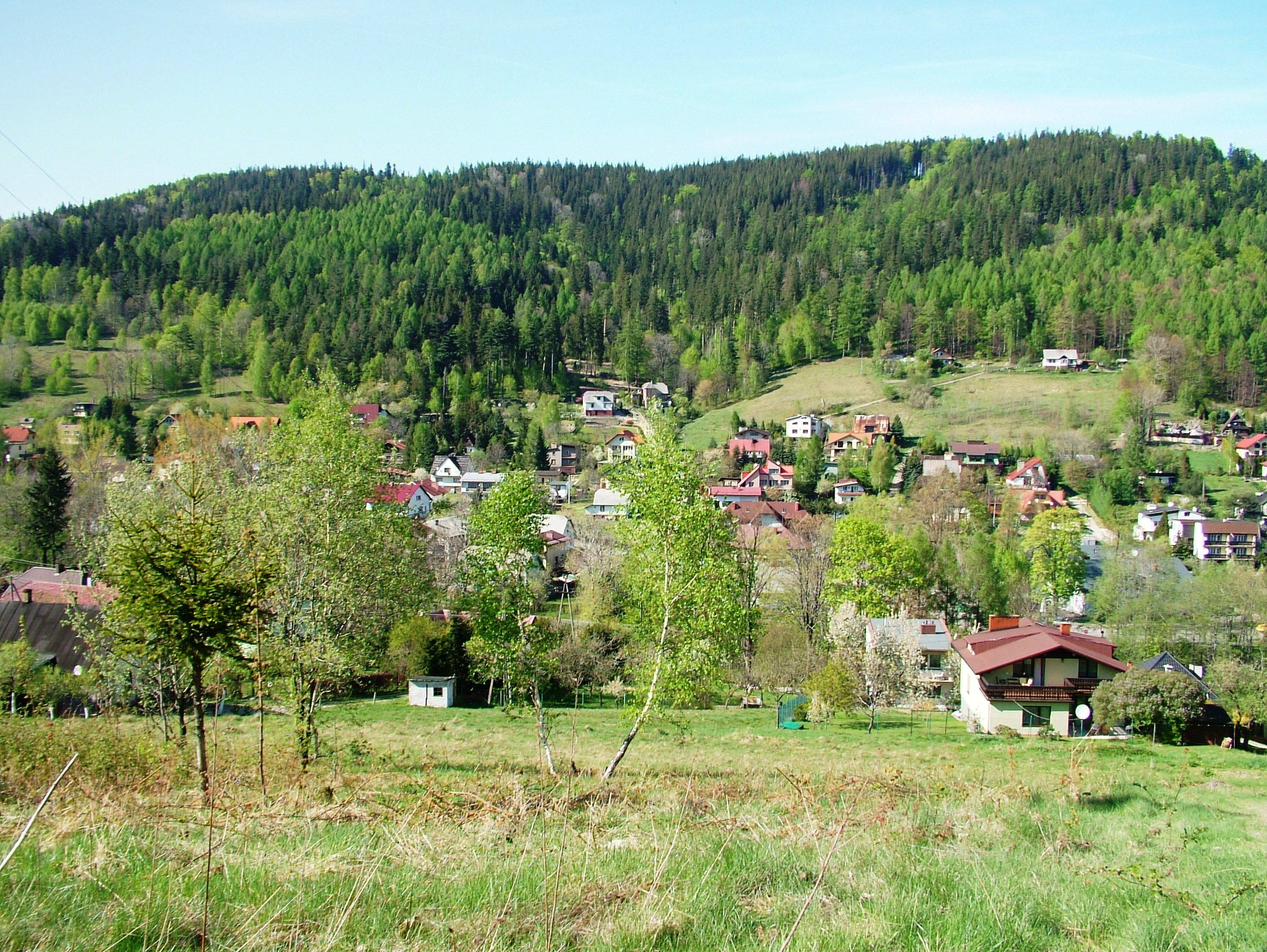 Kozia Góra od strony Bystrej